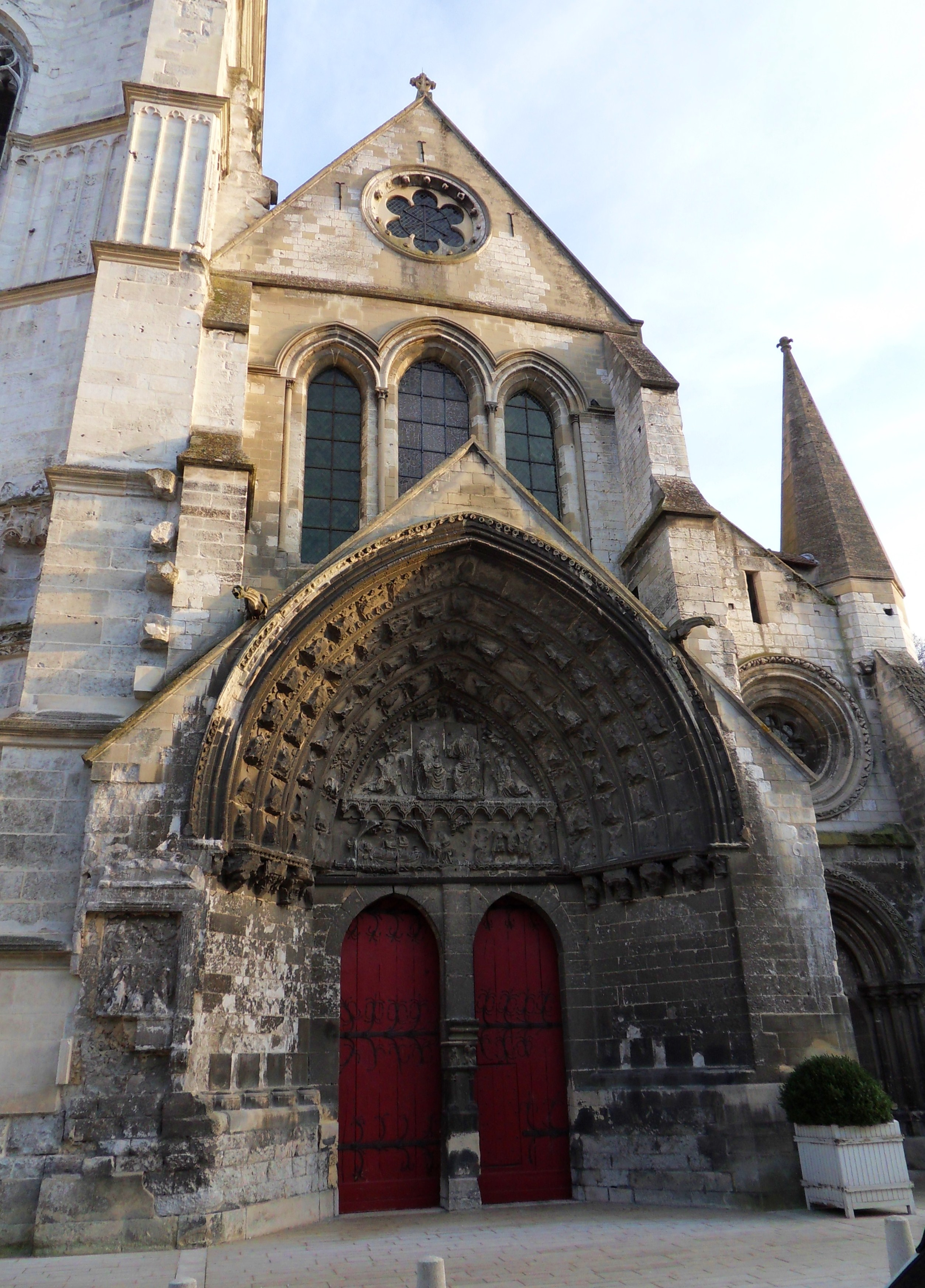 Beauvais (Oise, France). L'église Saint-Étienne.